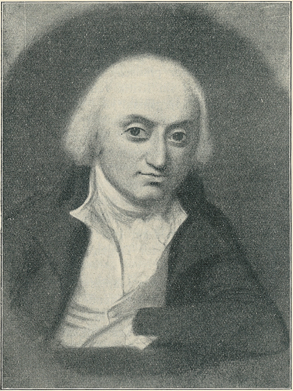 Sort hvid reproduktion af Jens Juels maleri af Niels Ditlev Riegels